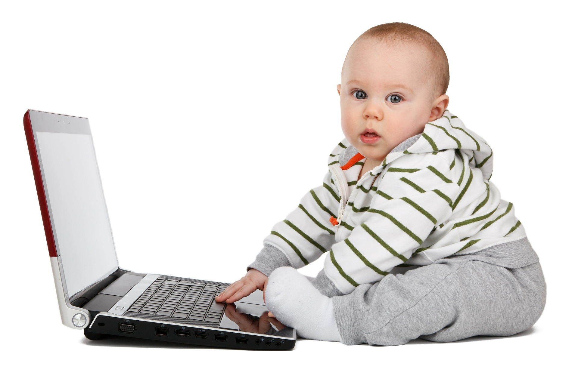 Natius digitals